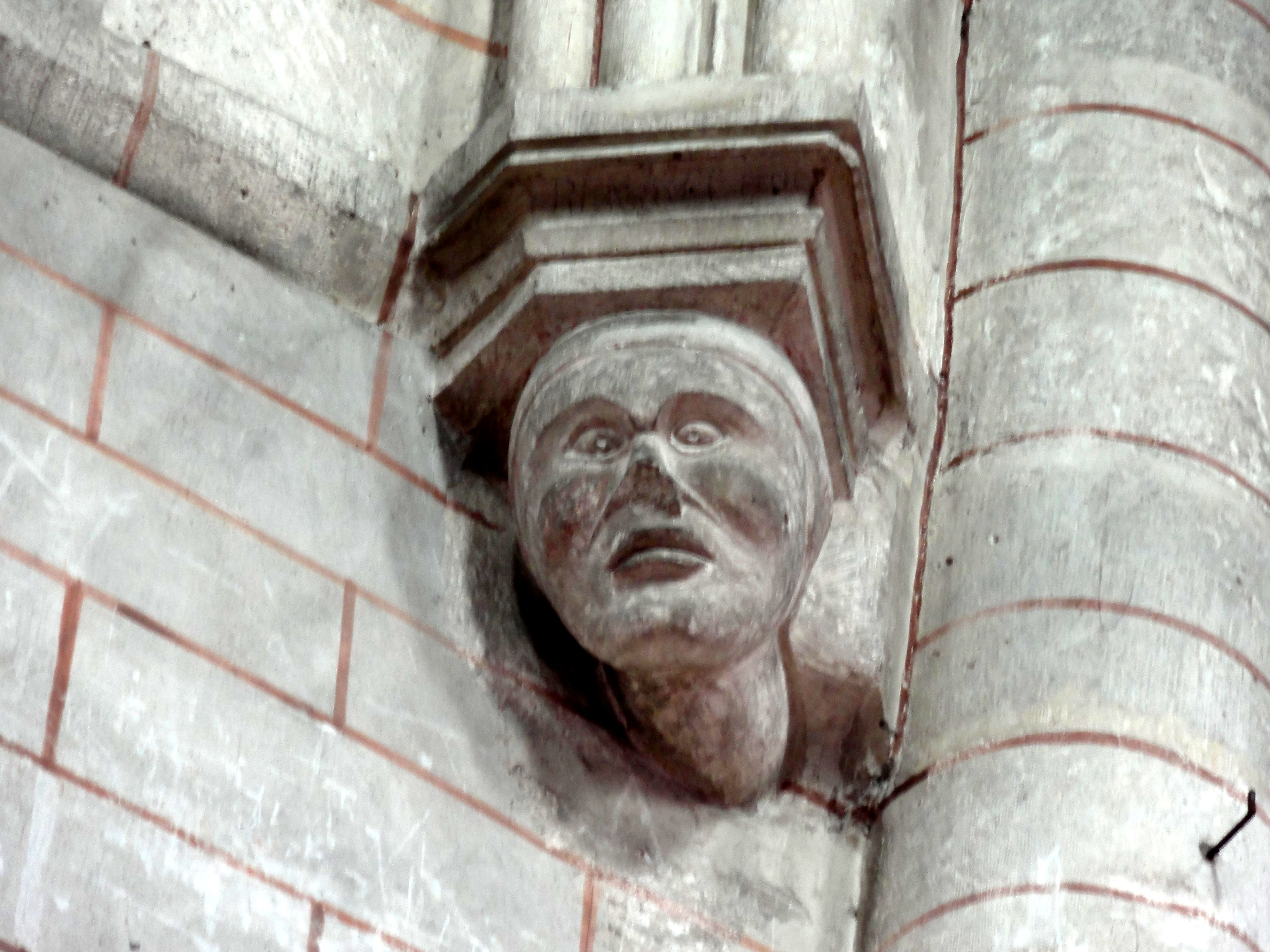 Troisième travée de la nef côté nord, cul-de-lampe à droite. Il représente vraisemblablement Hodierne de Gometz, fondatrice de la basilique en 1031.